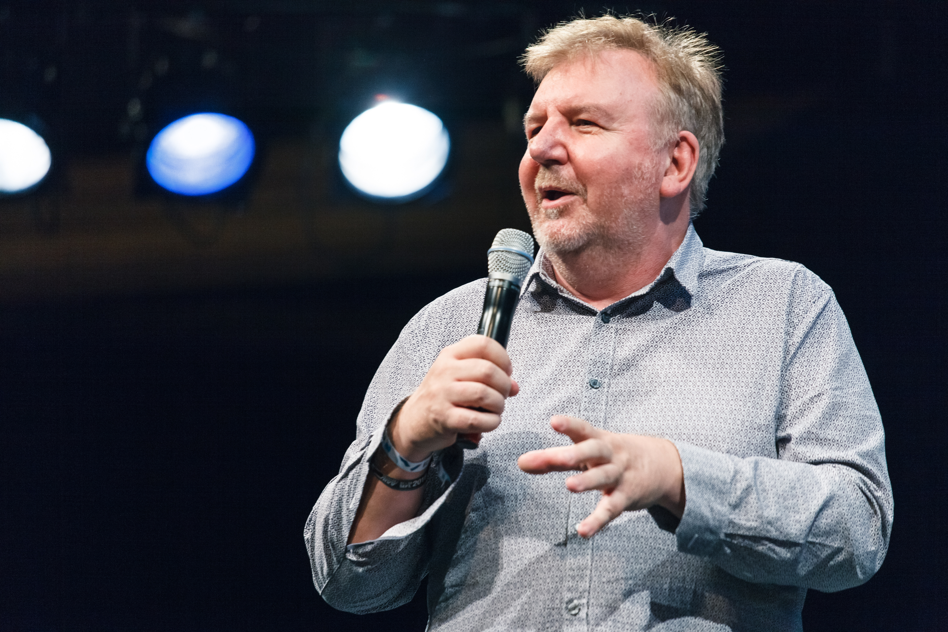 160922-NEXT16Day1-447